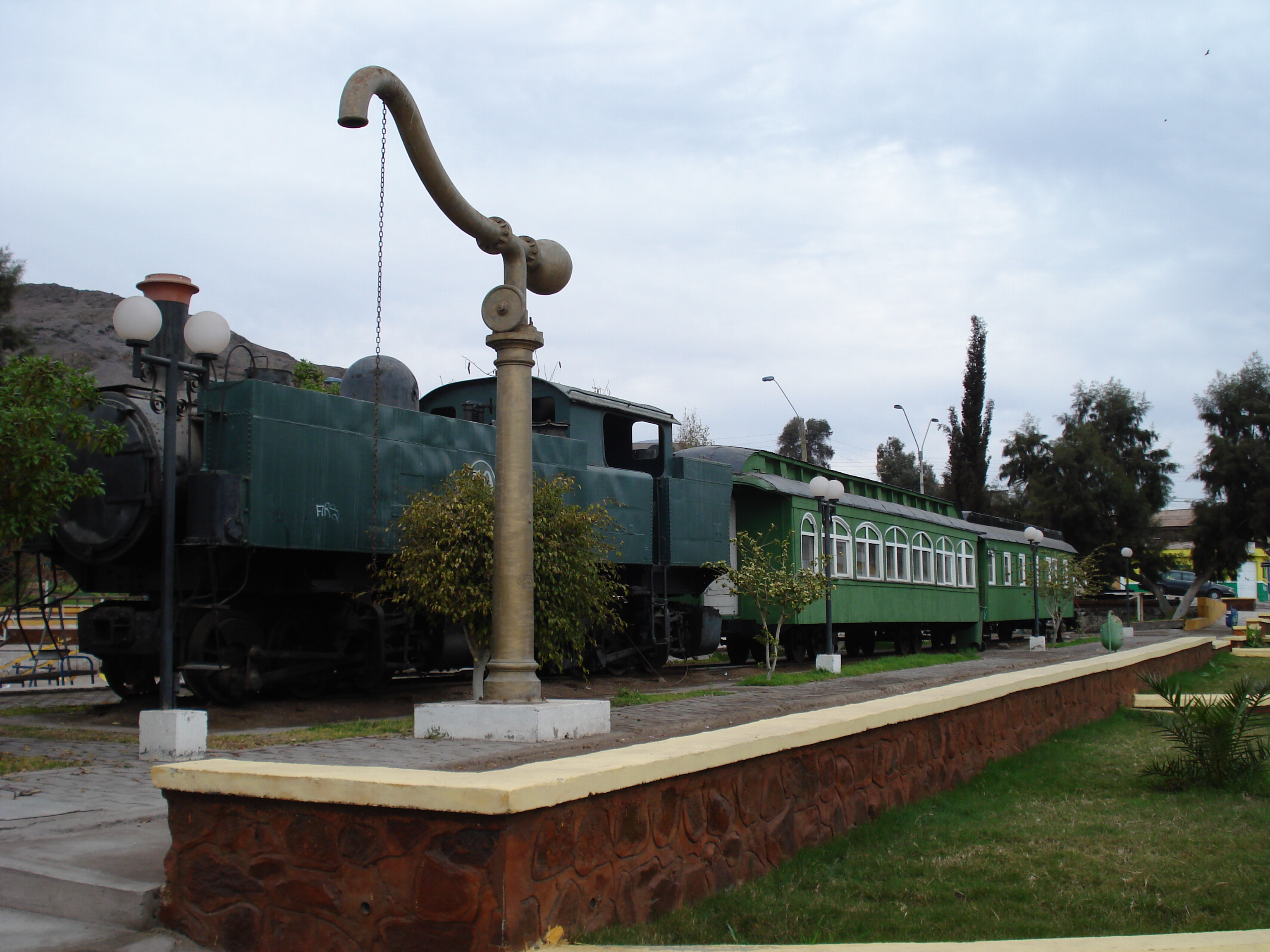 tren de taltal